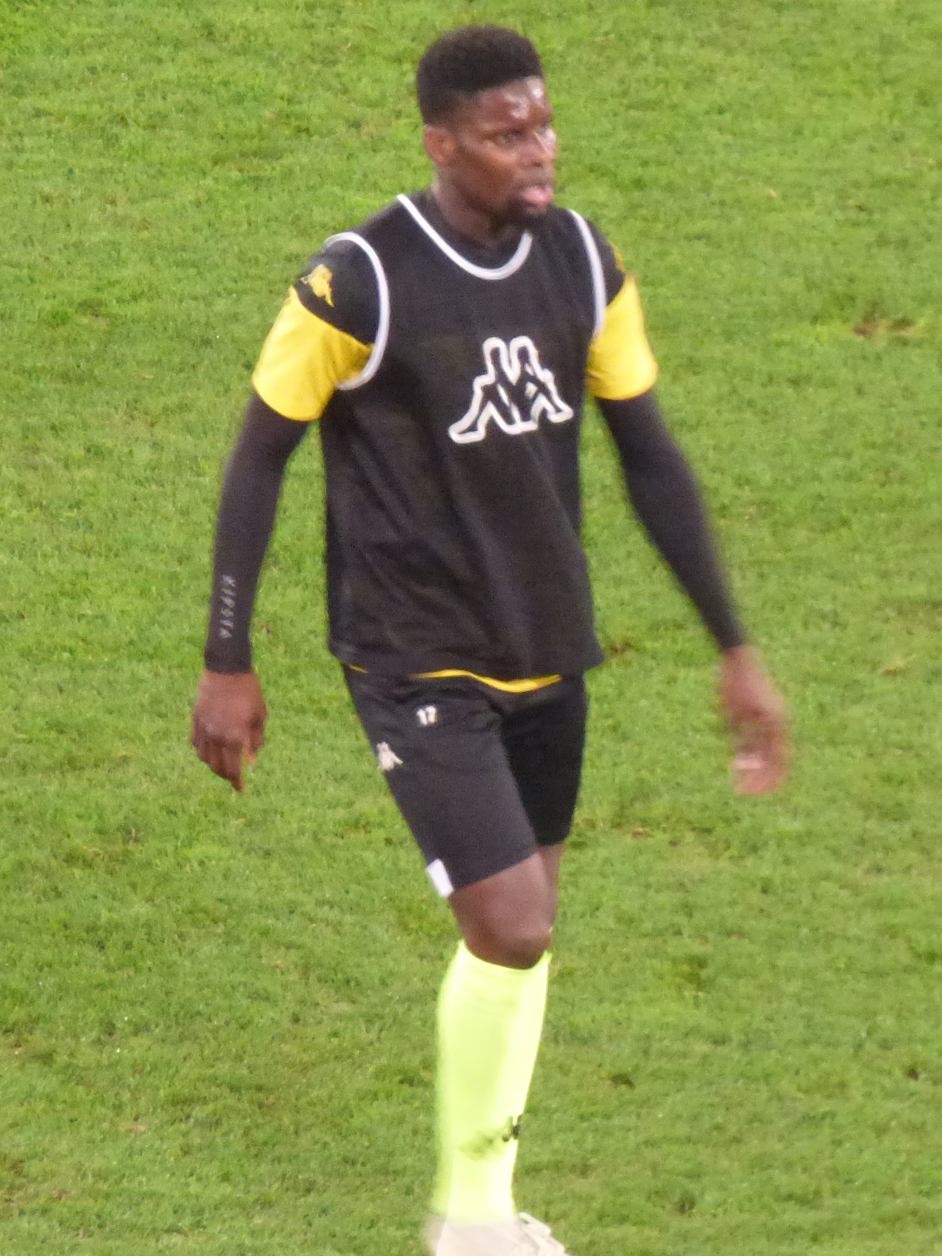 Alioune Ba avant le match RC Lens / US Orléans, comptant pour la vingt-huitième journée du championnat de France de football de Ligue 2 2019/2020, le 9 mars 2020.